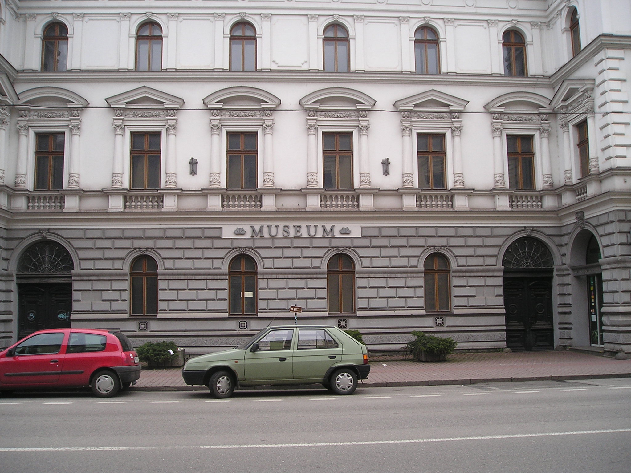 Bývalá budova Muzea Těšínska